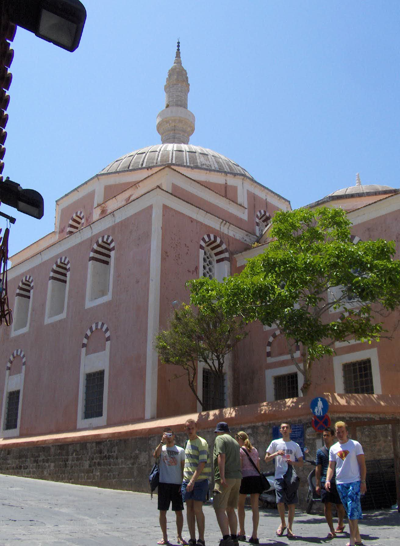 Meczet Sulejmana Wspaniałego, miasto Rodos